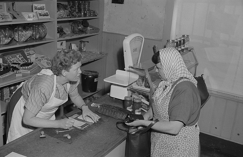 Original image description from the Deutsche Fotothek Kundin beim Einkauf